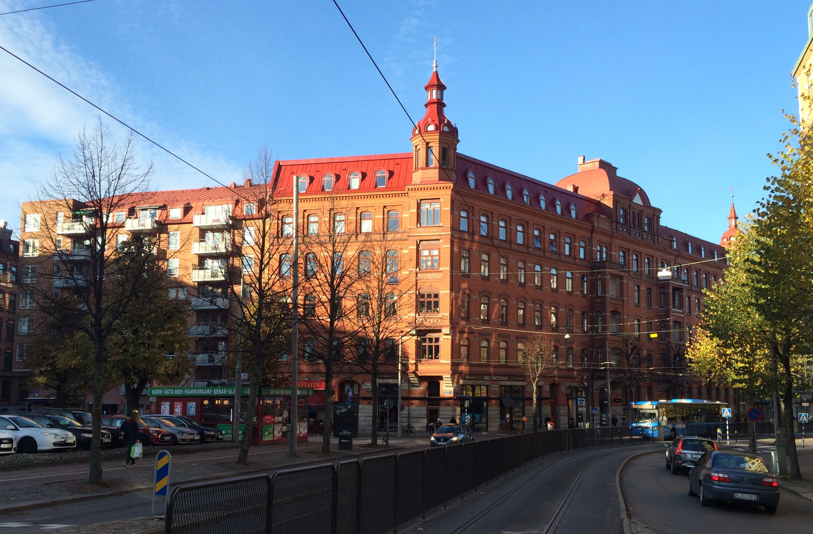 Hörnet Plantagegatan/Linnégatan i Masthugget, Göteborg.